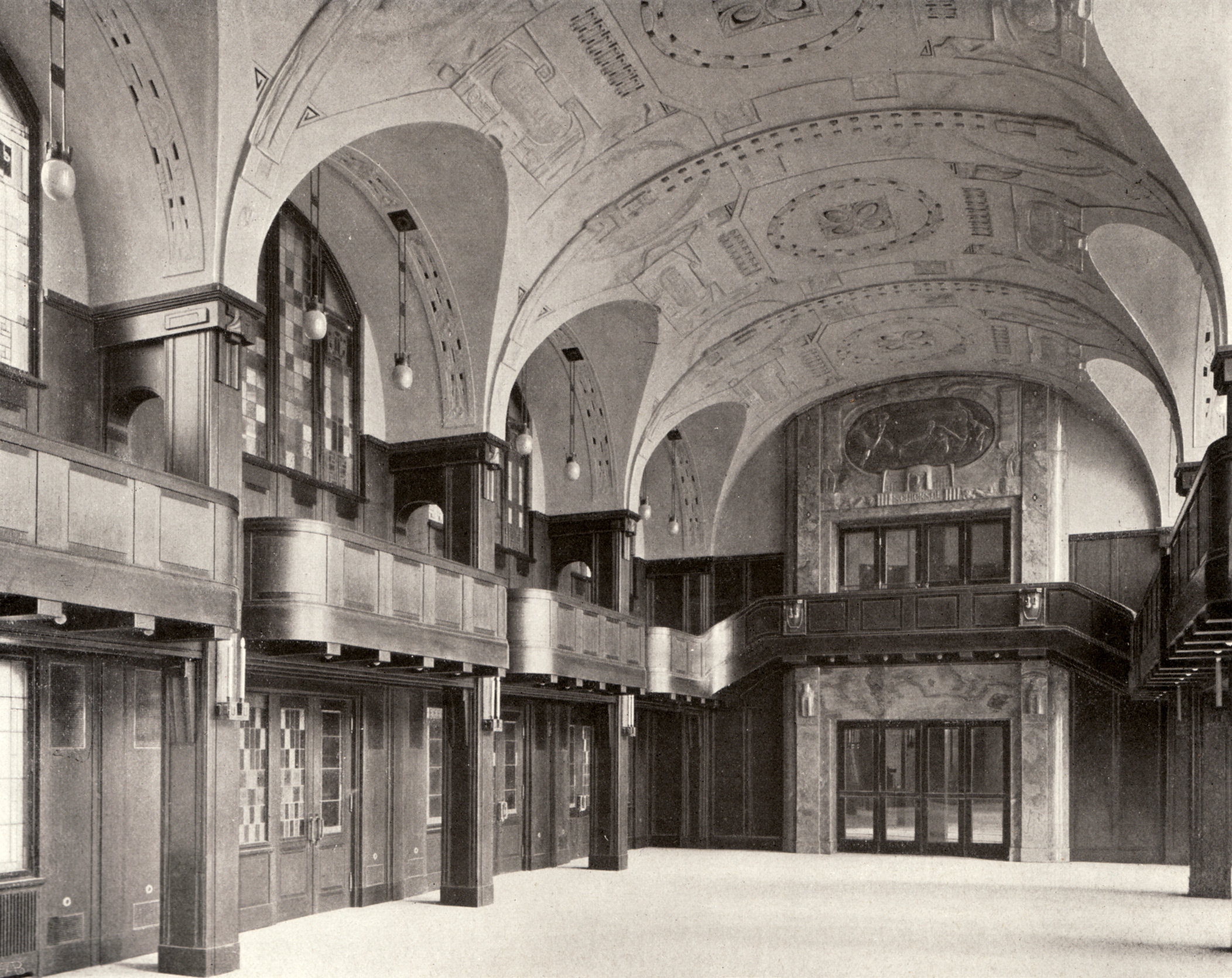 Berlin - Weinhaus Rheingold, Ansicht des Bankettsaales in Richtung der Rotunde